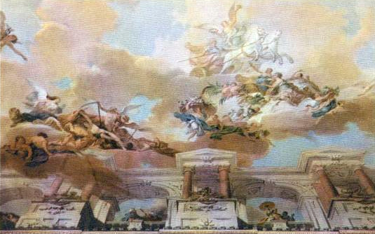 Postcard